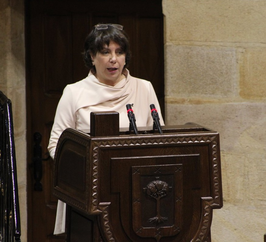 Padrones Sanjuanes